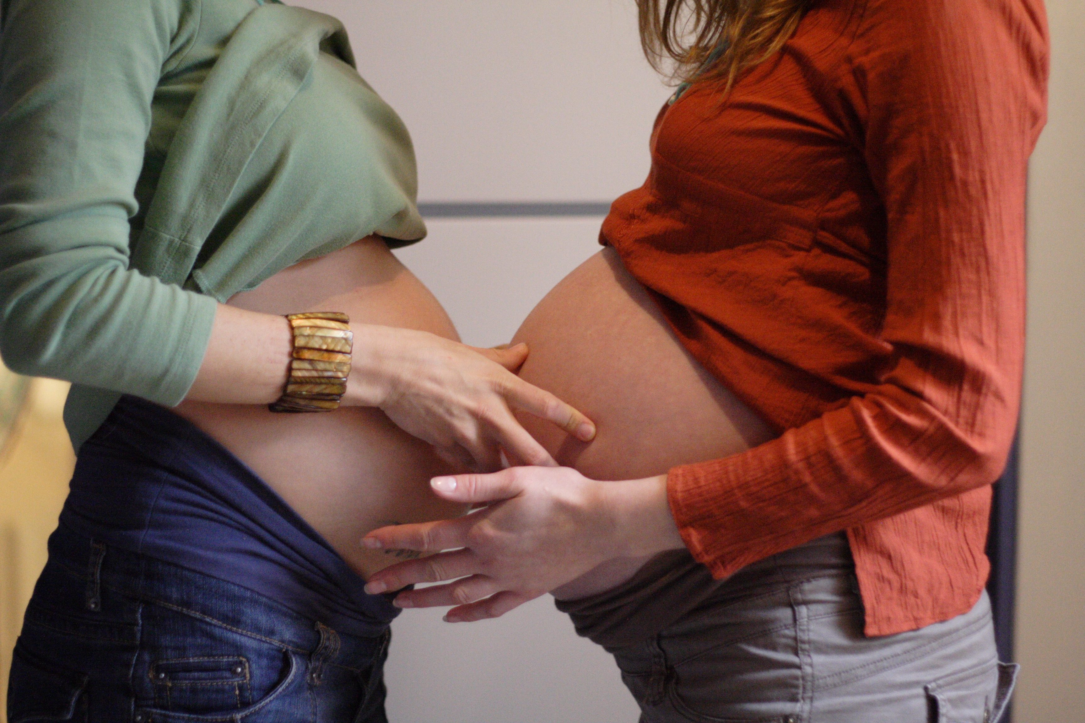 big bellies